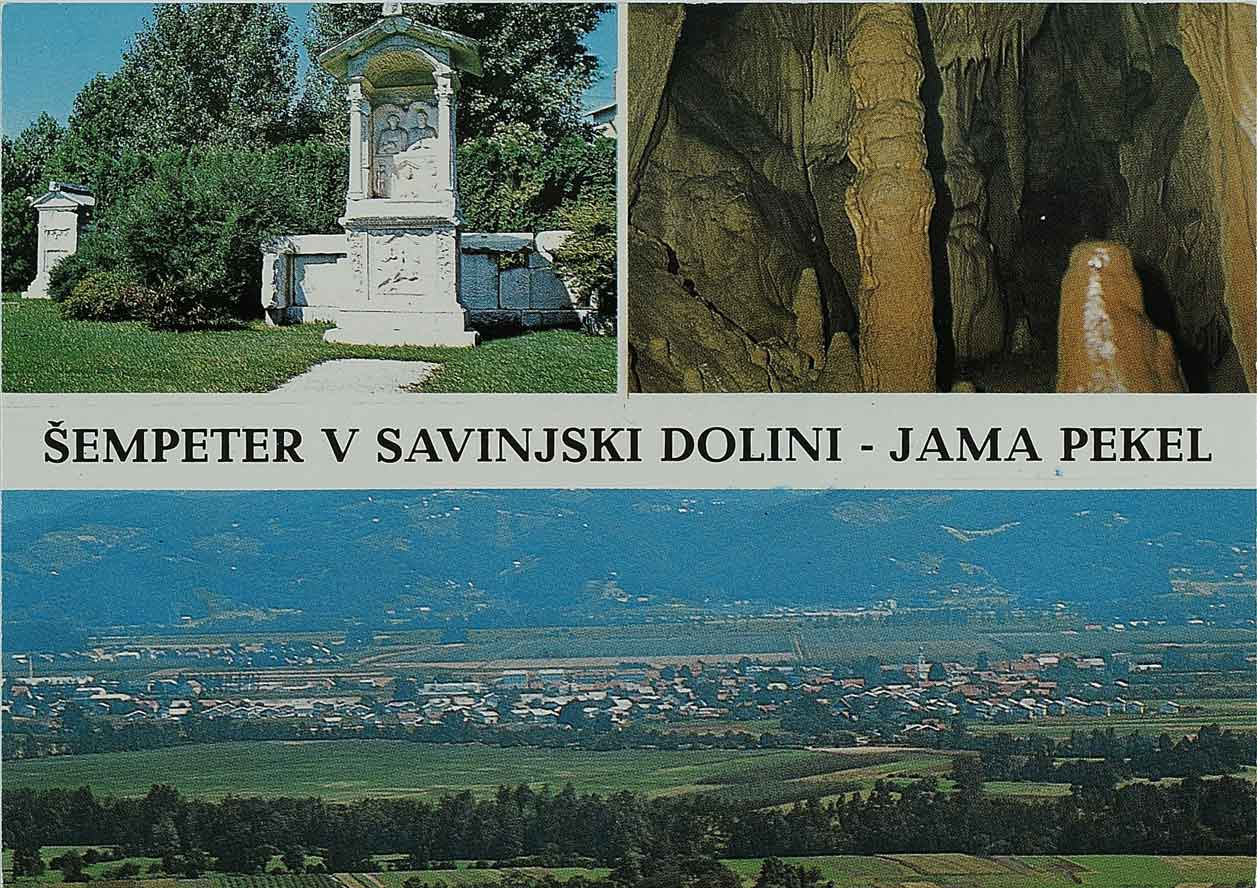 Razglednica Šempetra v Savinjski dolini.